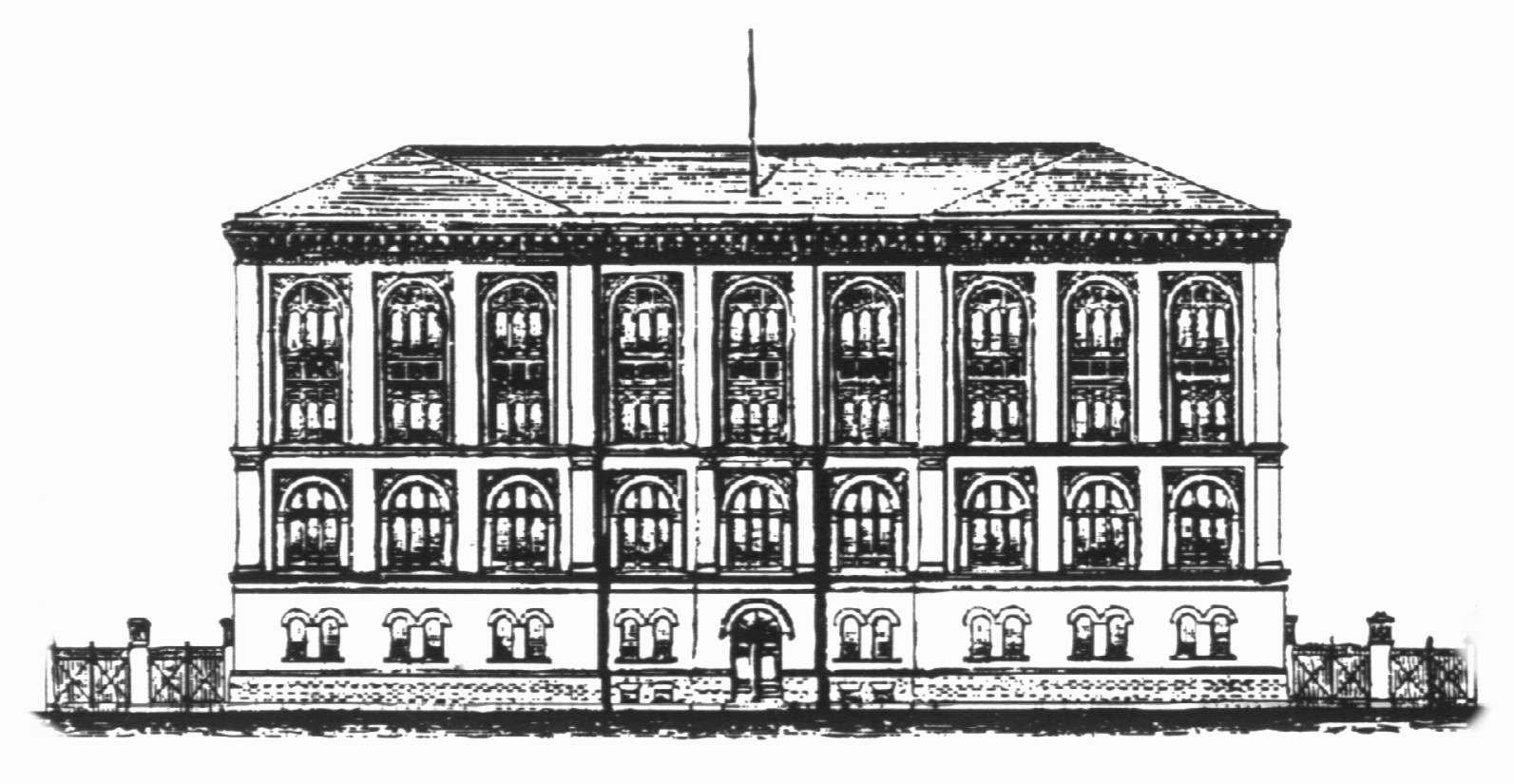 ehemalige Kaserne der Garde-Pioniere und des Montierungsmagazins in Berlin, 1945 zerstört